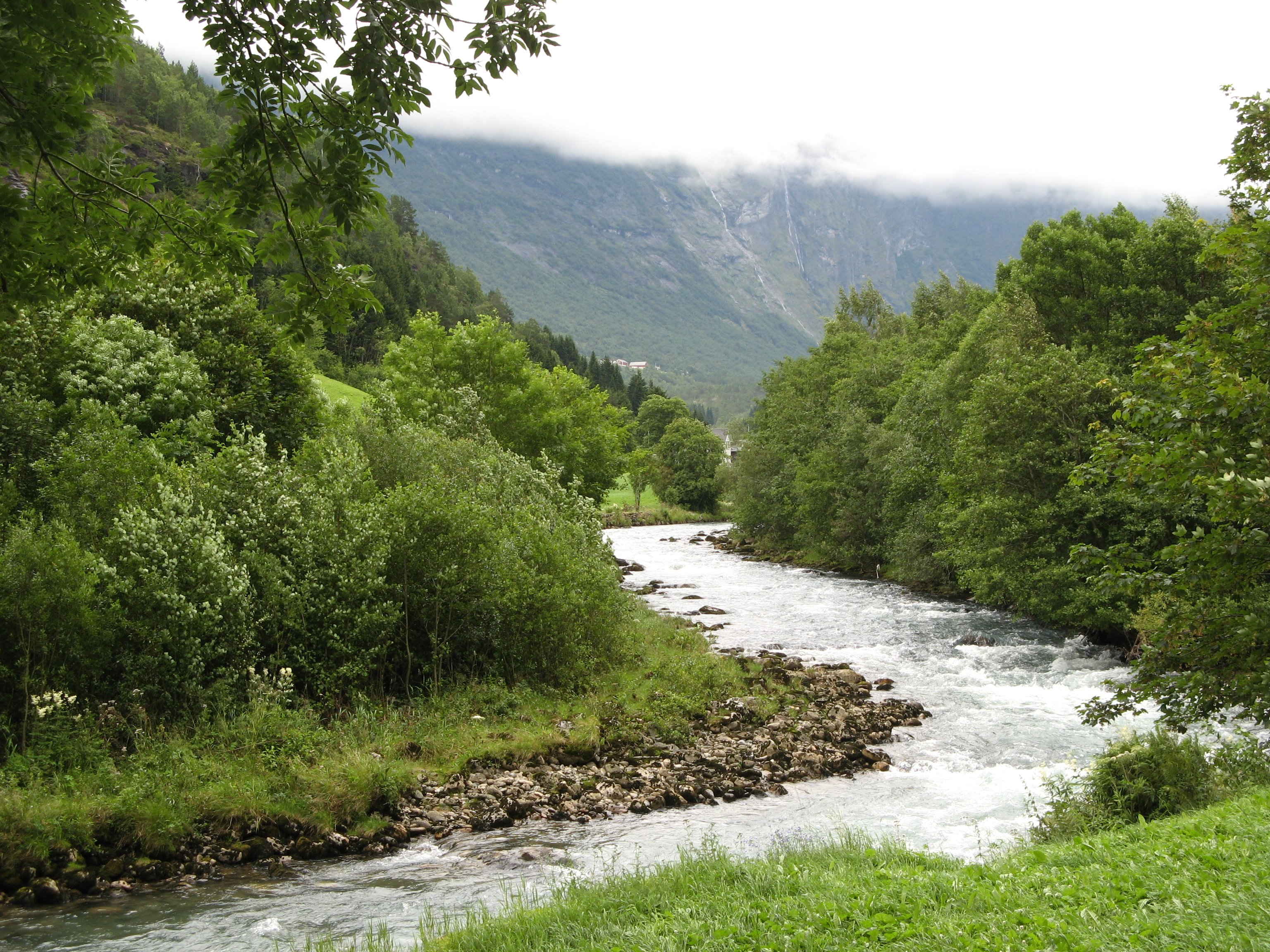 Fluss bei Hellesylt